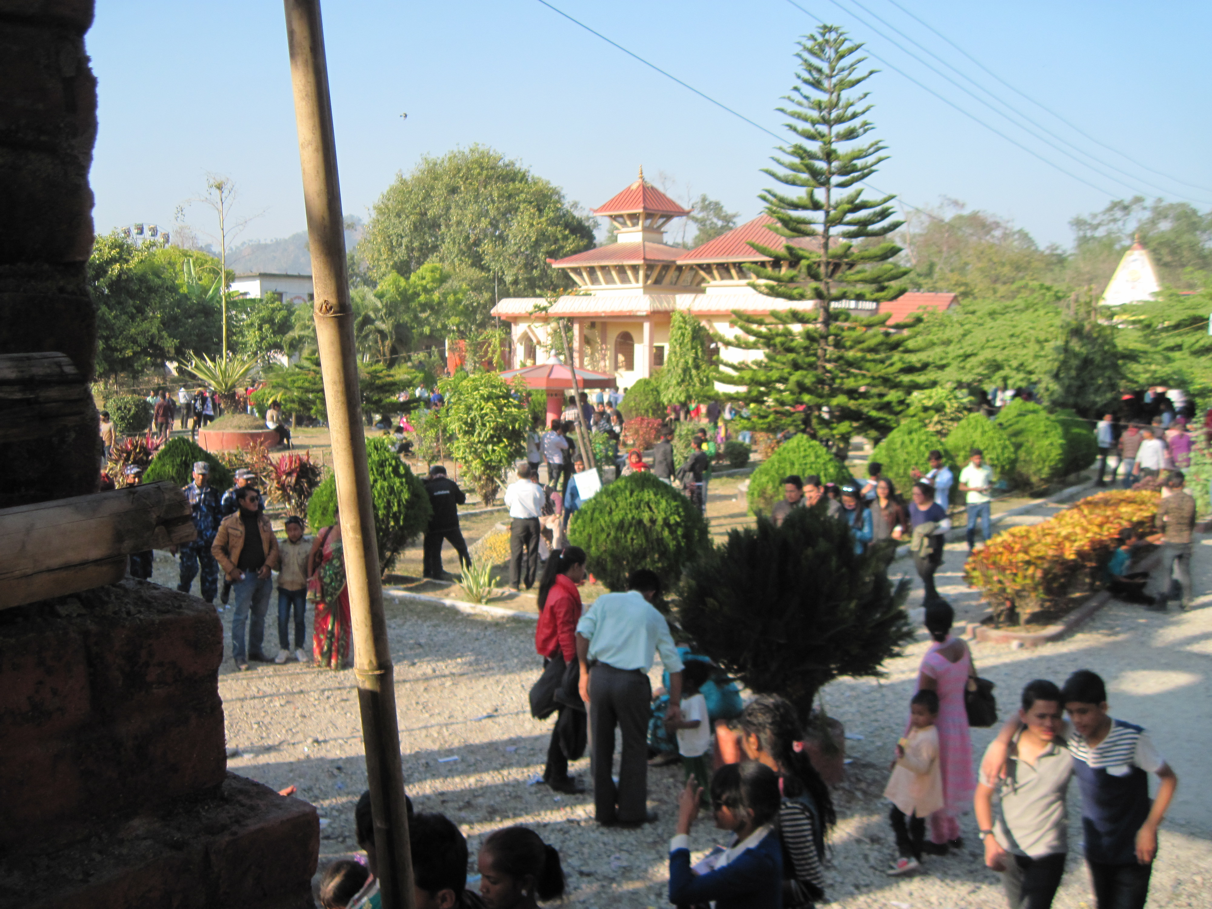 नेपाली: कनाकार्इ नदीकाे पूर्वी किनारमा परम्परादेखि लागिअाएकाे माघेसंक्रान्ति मेला २०७१ सालमा पनि भव्य रूपमा सम्पन्न भएकाे छ । साे मेलाका केही झलकहरू यहा दिइएकाे छ ।